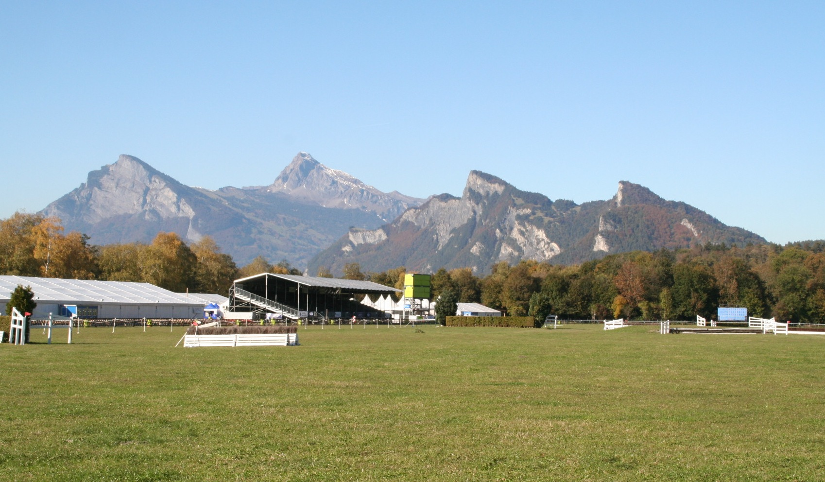 Internationales Pferderennen Maienfeld Bad Ragaz, Oktober 2011